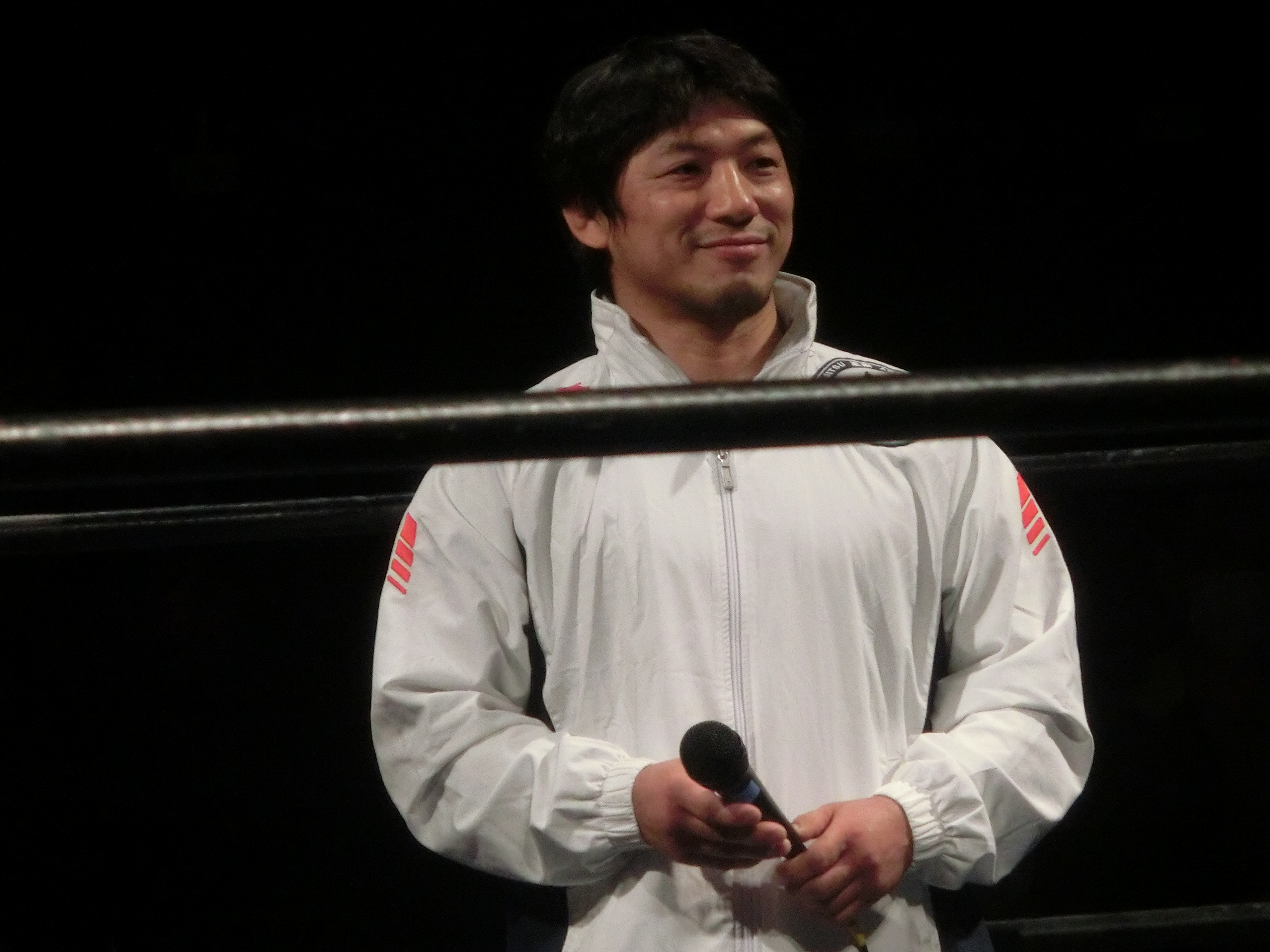 内柴 正人（2017年、ハードヒット）